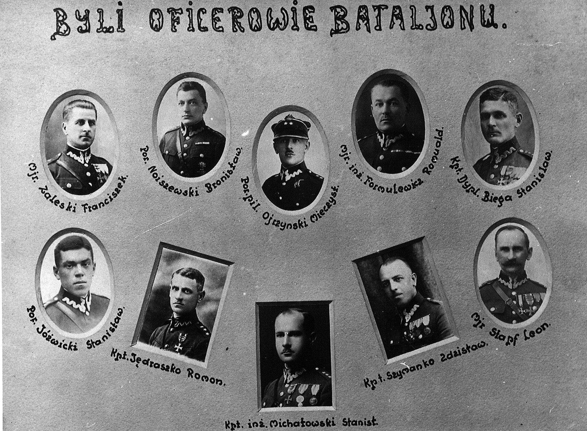 zdjęcie z albumu